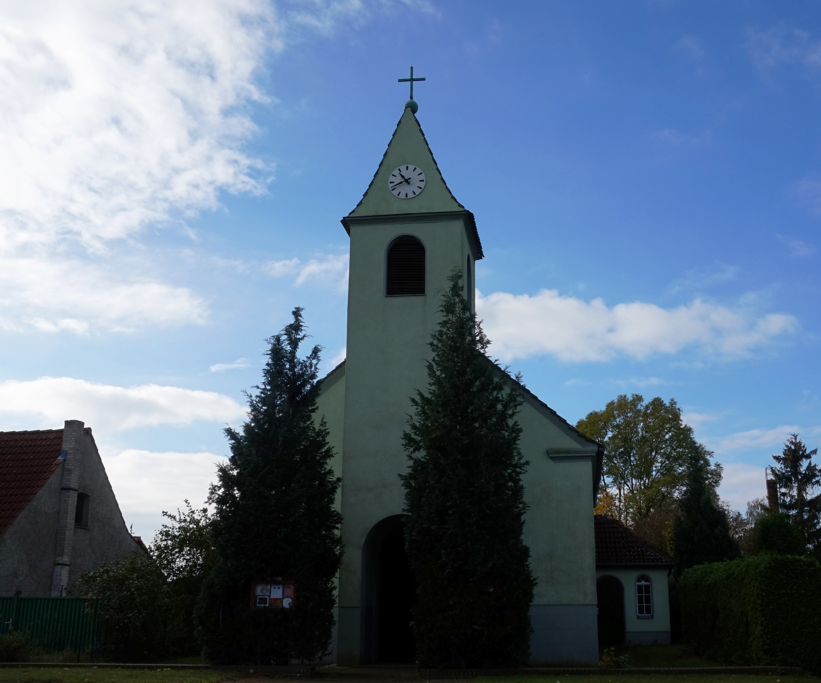 Hoffnungskirche in Neu Hatmannsdorf OT von Spreenhagen. Diese Kirche wird auch Honigkirche genannt, da der Altar und die Rückwand aus 1000 Kilogramm Bienenwachs gestaltet sind.